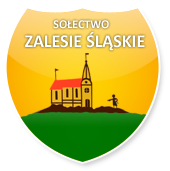 Herb odtworzony z pieczęci miejscowości